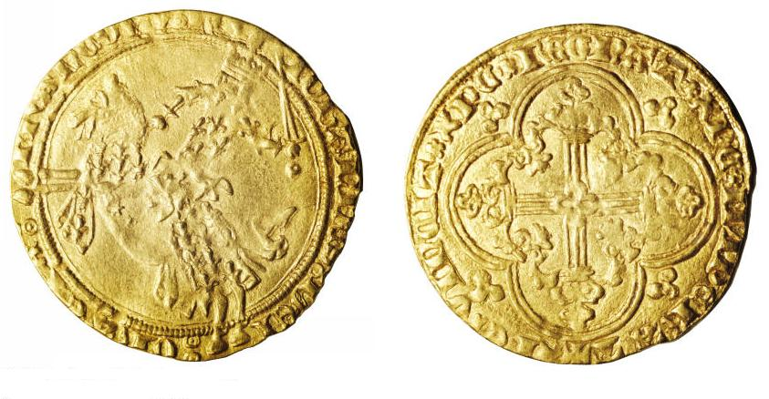 Photo de ma collection personnelle